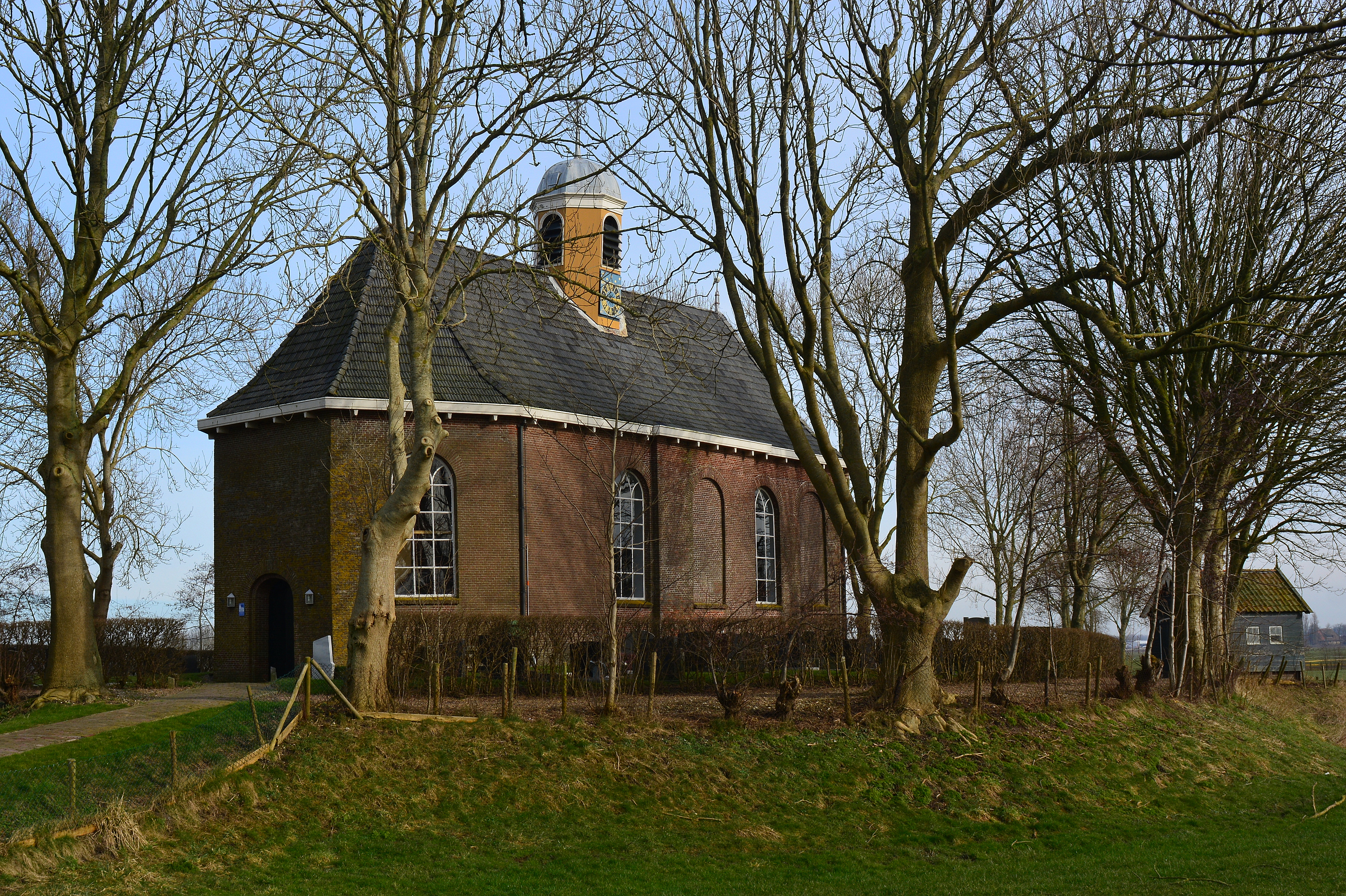 Sweins, Protestanske Reginatsjerke